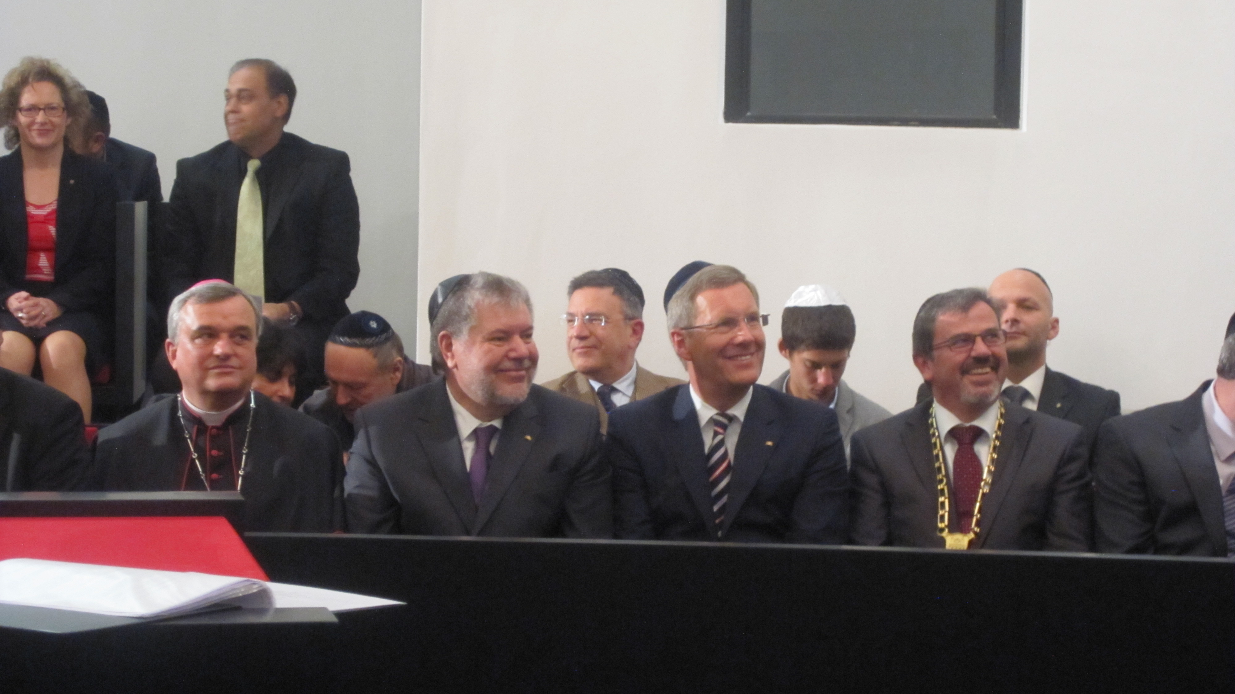 Einweihung der Synagoge in Speyer; Ausschnitt: Ehrengäste, erste Reihe von links: Karl-Heinz Wiesemann (kath. Bischof von Speyer), Kurt Beck (Ministerpräsident von Rheinland-Pfalz, Bundespräsident Christian Wulff, Hansjörg Eger (Oberbürgermeister von Speyer)